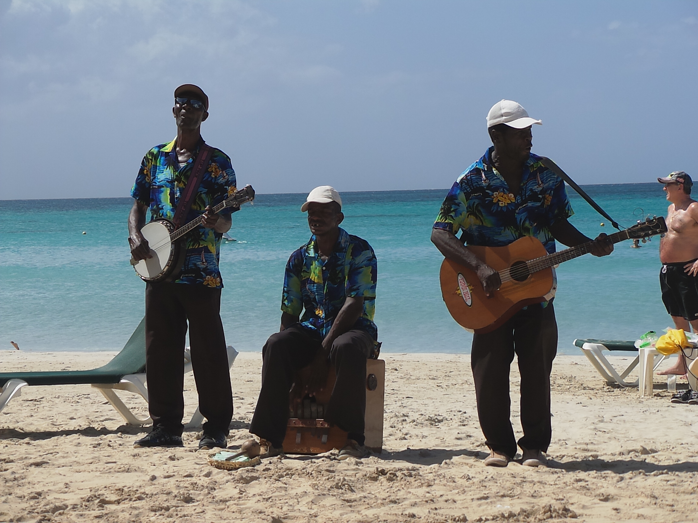 Beach Singers